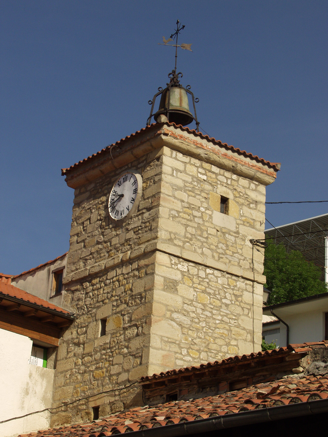 Torre del Reloj de Salinas de Añana construida en el siglo XVIII (País Vasco, España)